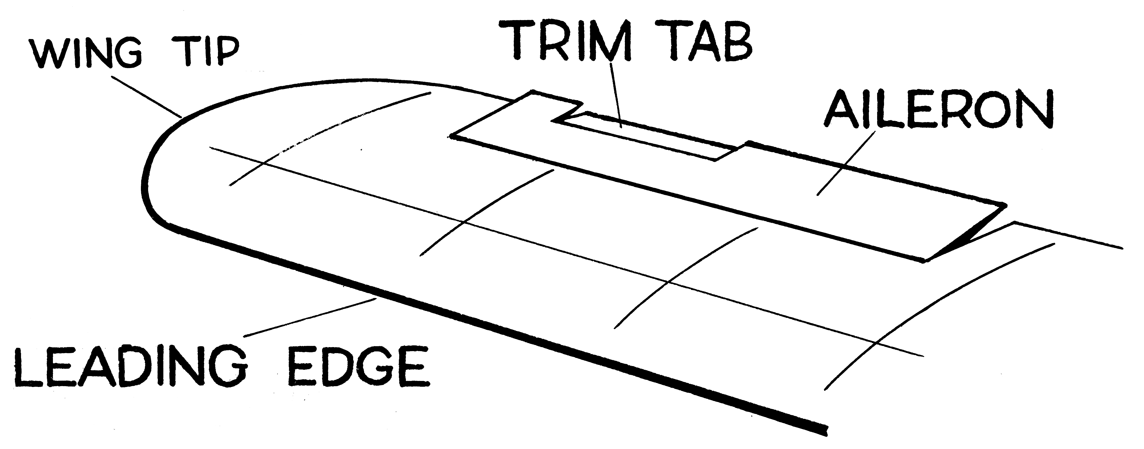 Alieron